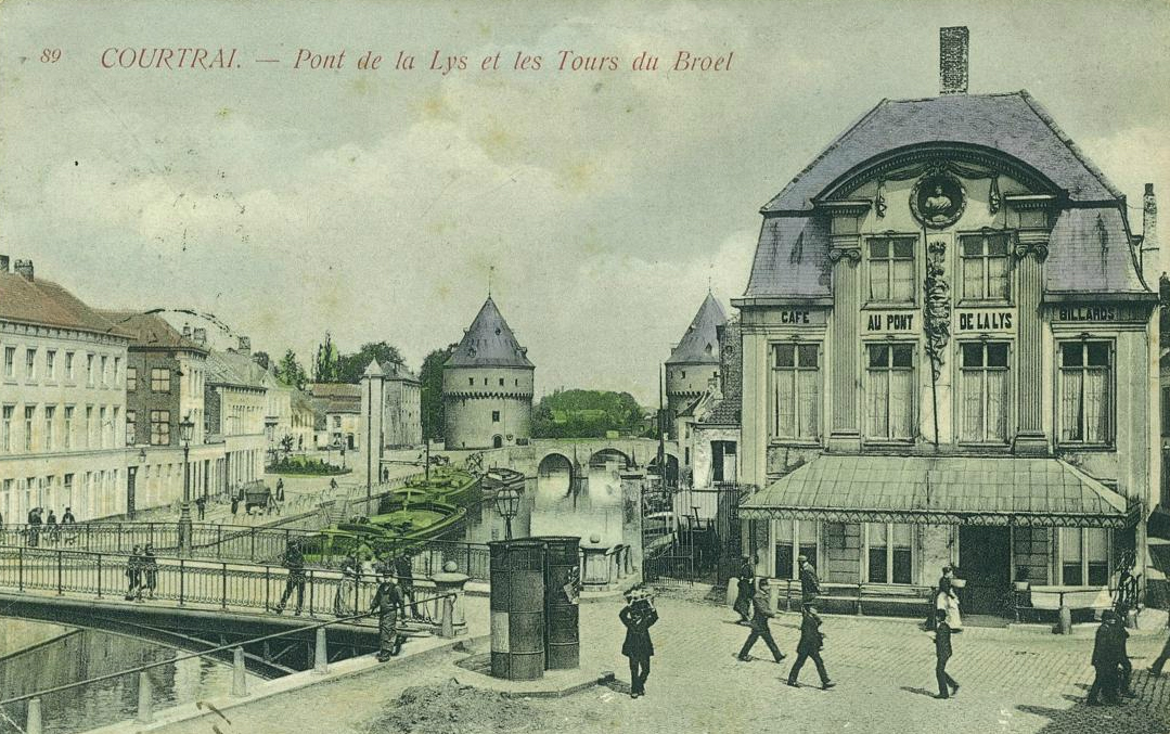 Historisch gebouw 'In de Leiebrug' te Kortrijk